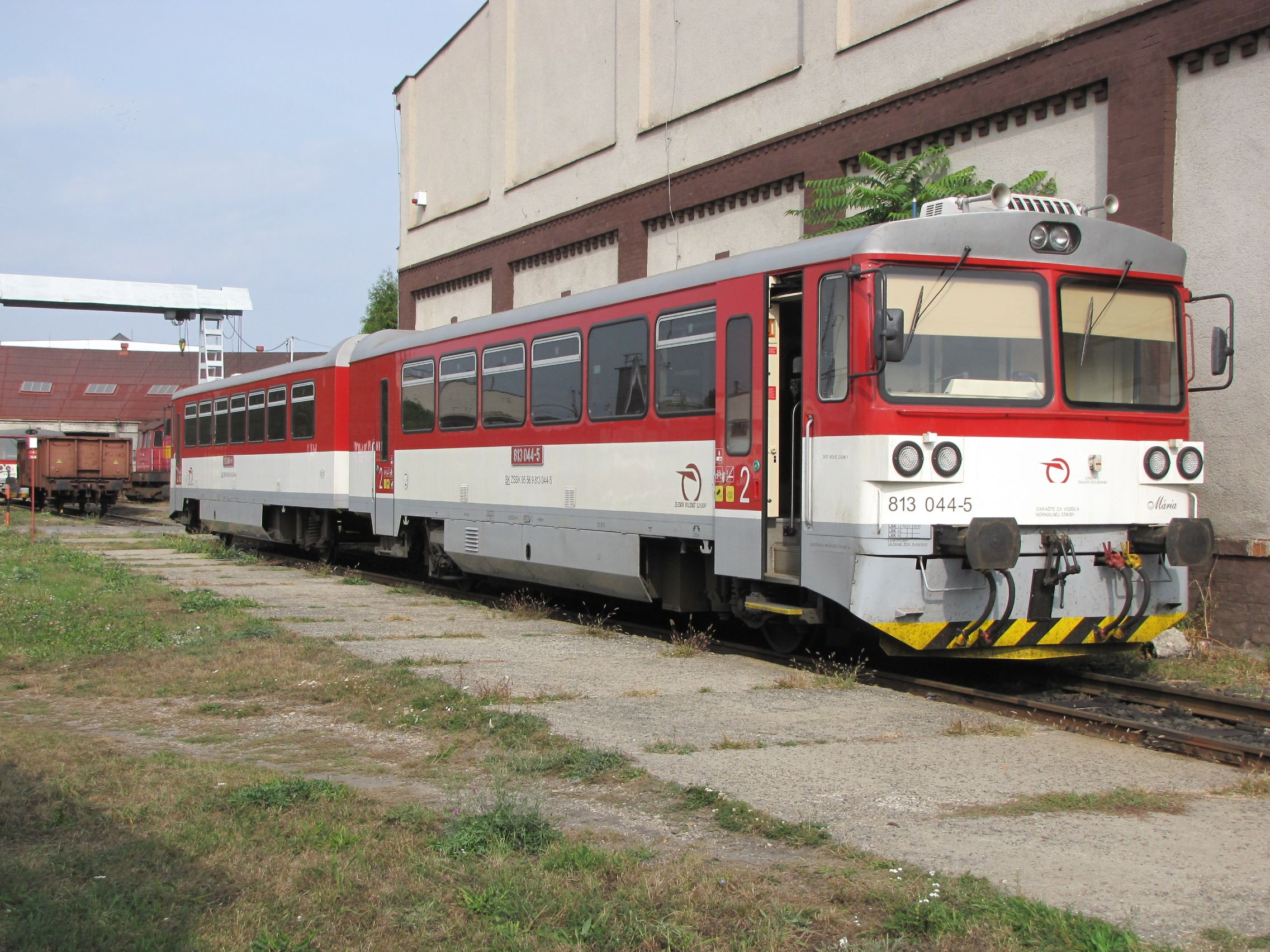 Szlovákia, Érsekújvár (Nové Zámky), SK-ZSSK 813 044-5 (Mária)